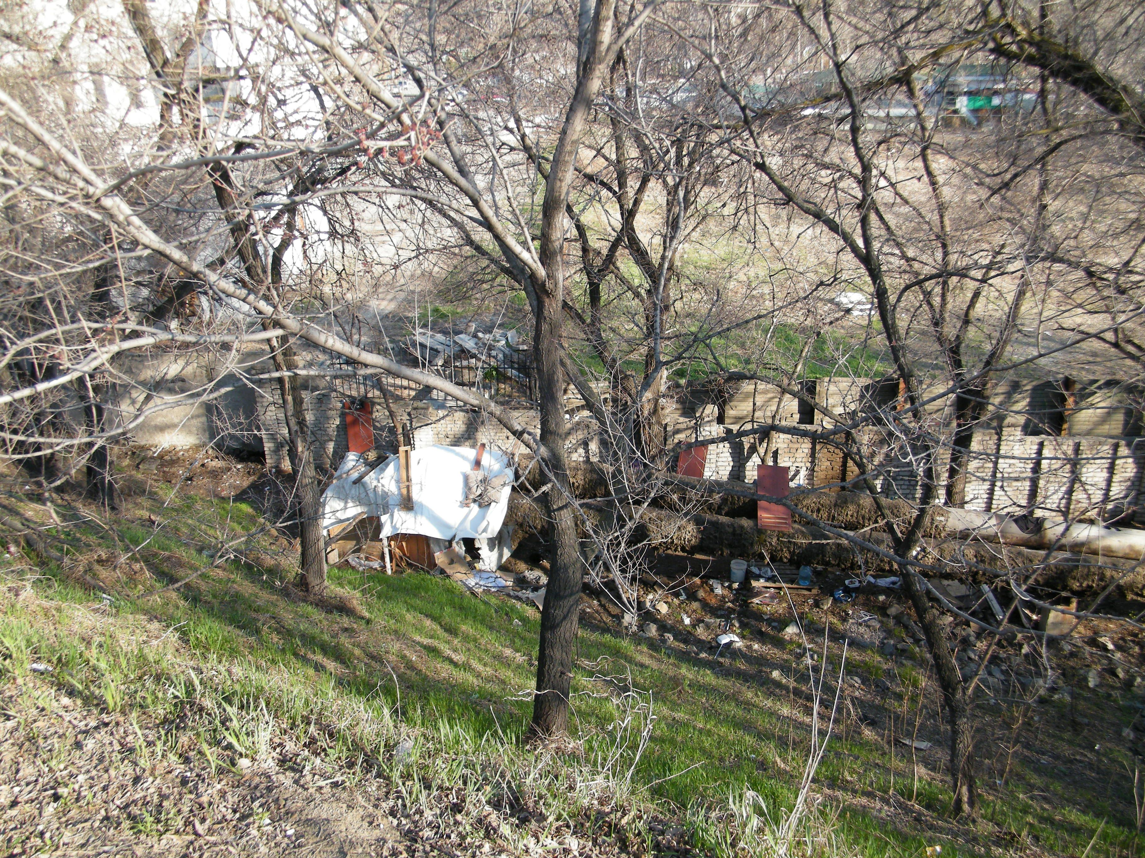 Бомжи построили хижину вокруг теплотрассы Хабаровск